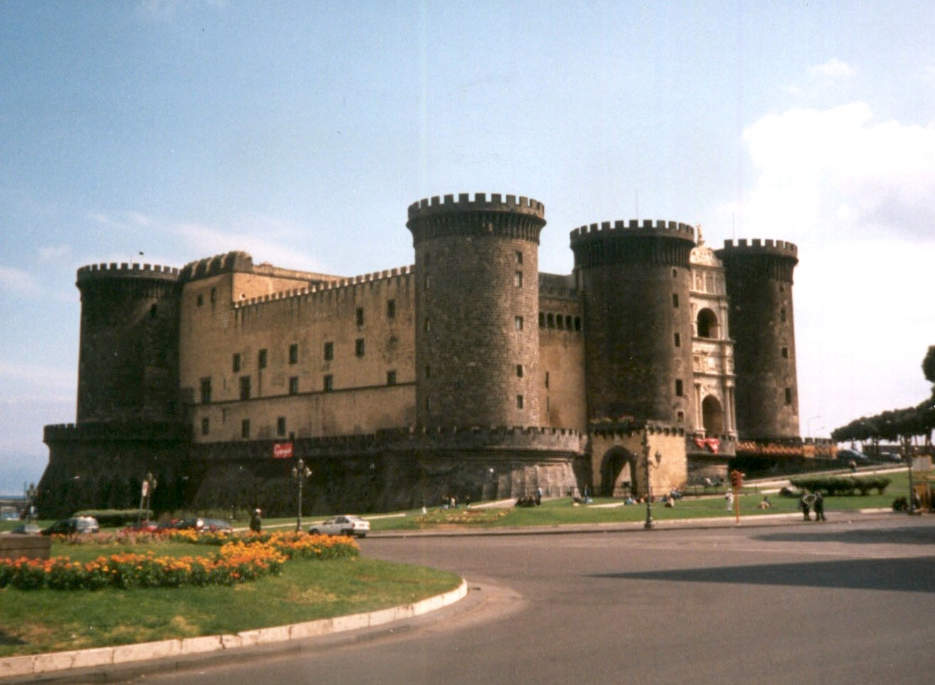 Naples, Castel Nuovo (Maschio Angioino) view from Piazza Municipio.